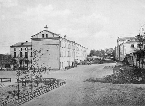 126. Сокольническое ОтдЪленiе Работнаго Дома и Дома Трудолюбiя. Контора, мастерскiя и помЪщенiя для призрЪваемыхъ.